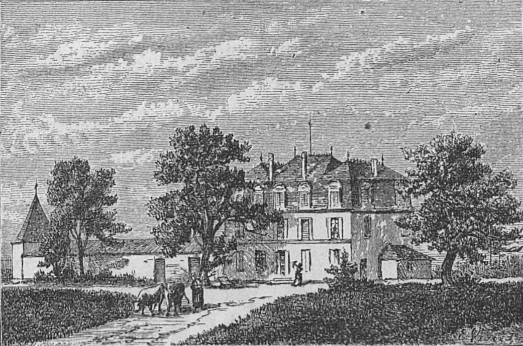 Illustration du Château Guiraud dans l'ouvrage Bordeaux et ses vins (6ème édition) de Charles Cocks et Edouard Féret publié en 1893